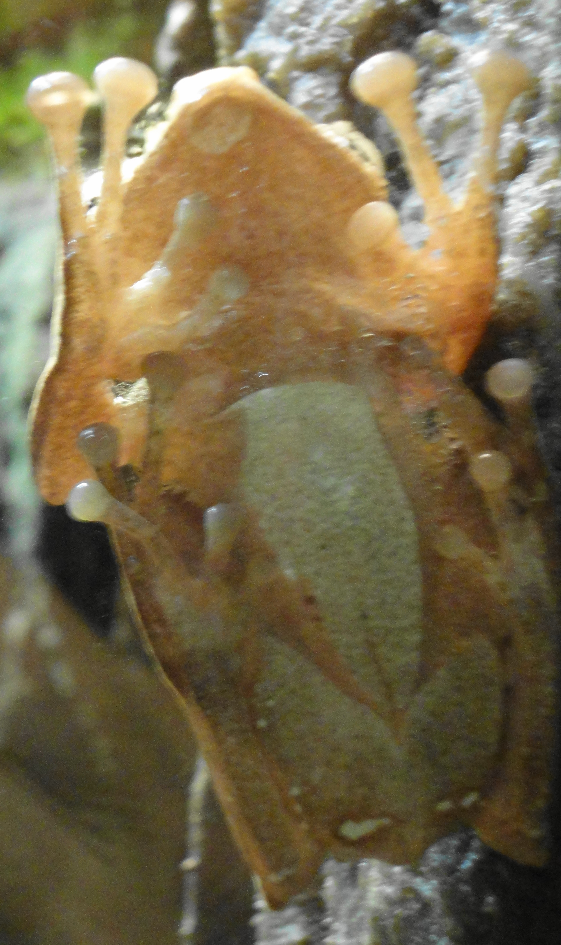 Le Polypédate de Bornéo